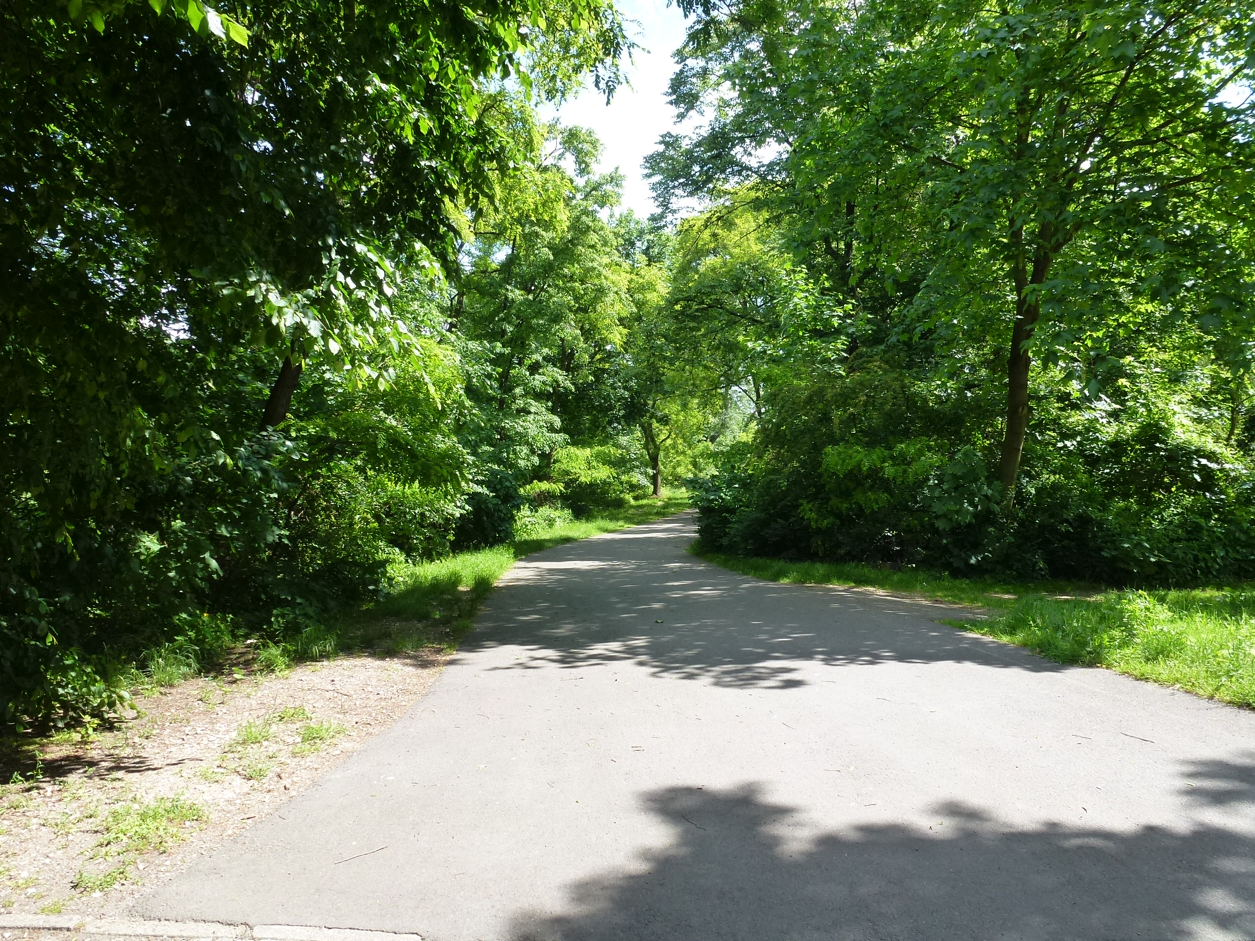 Berlin-Britz Delfter Ufer